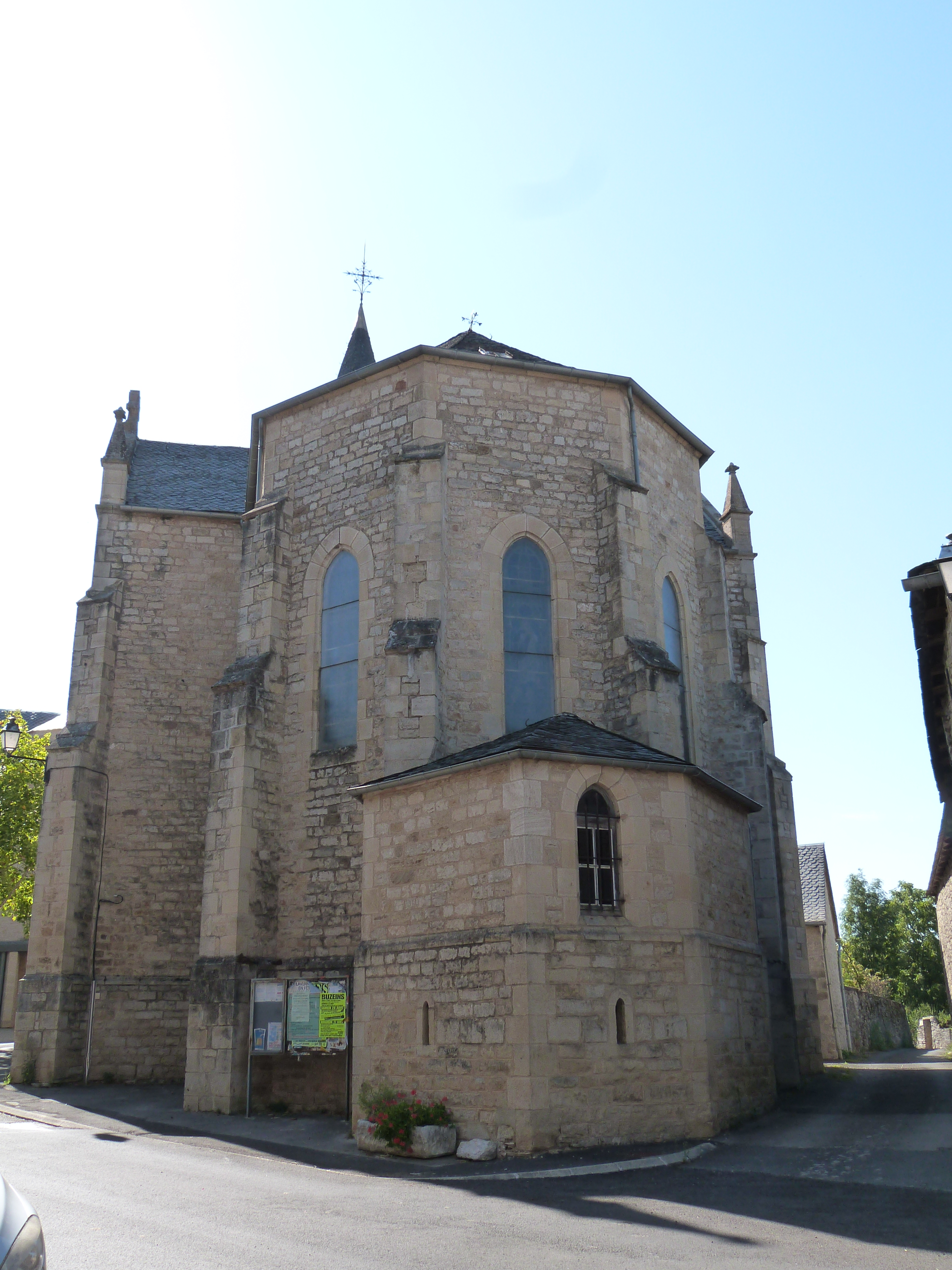 Chevet de l'église de Sévérac-l'Eglise